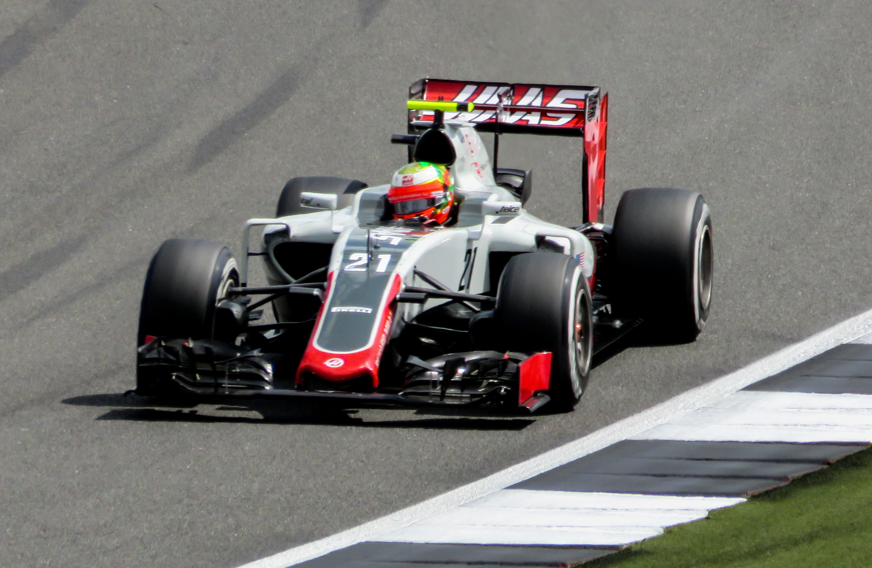 F1 - Haas F1 - Esteban Gutierrez